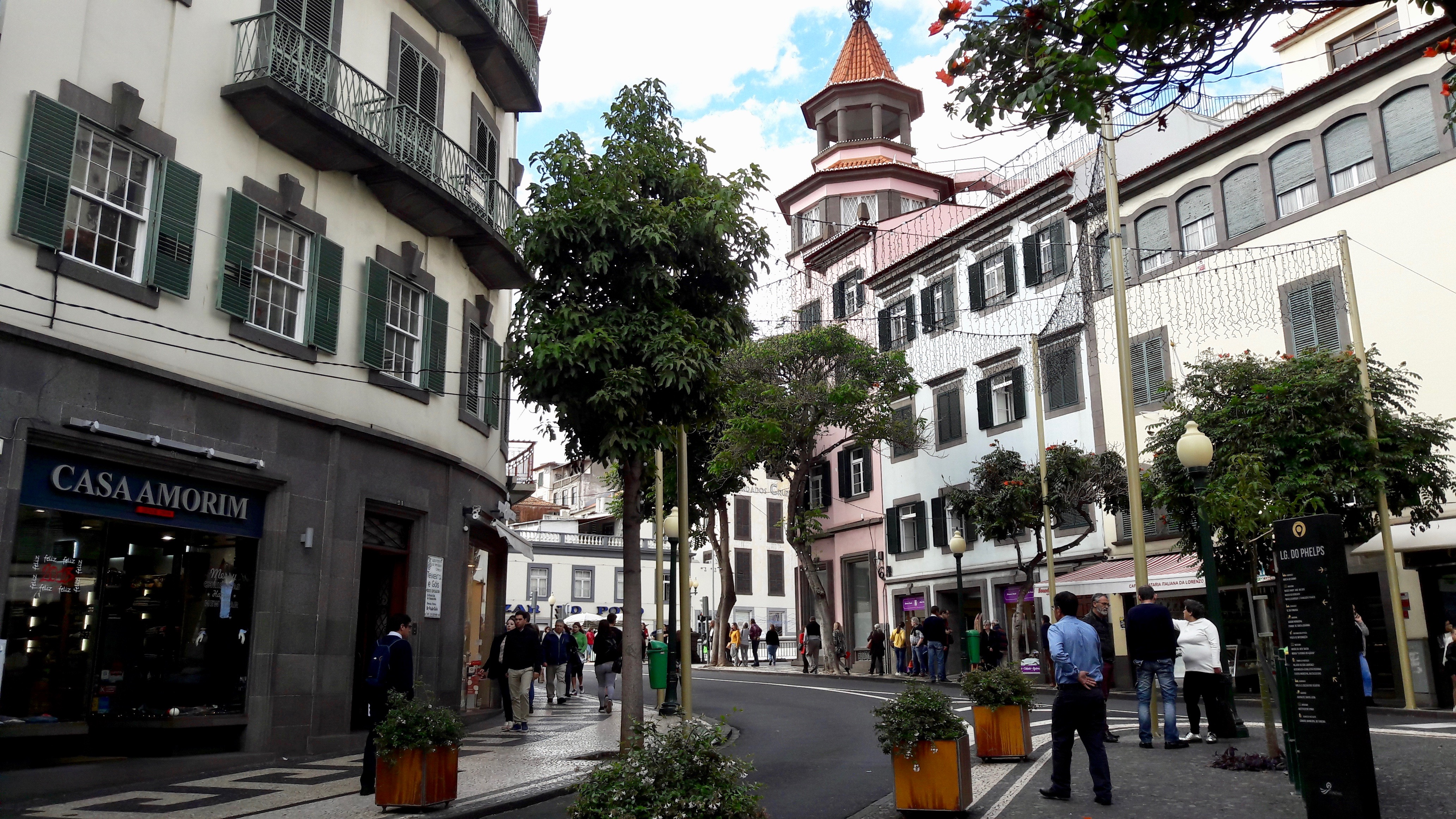 Centro histórico do Funchal, Madeira